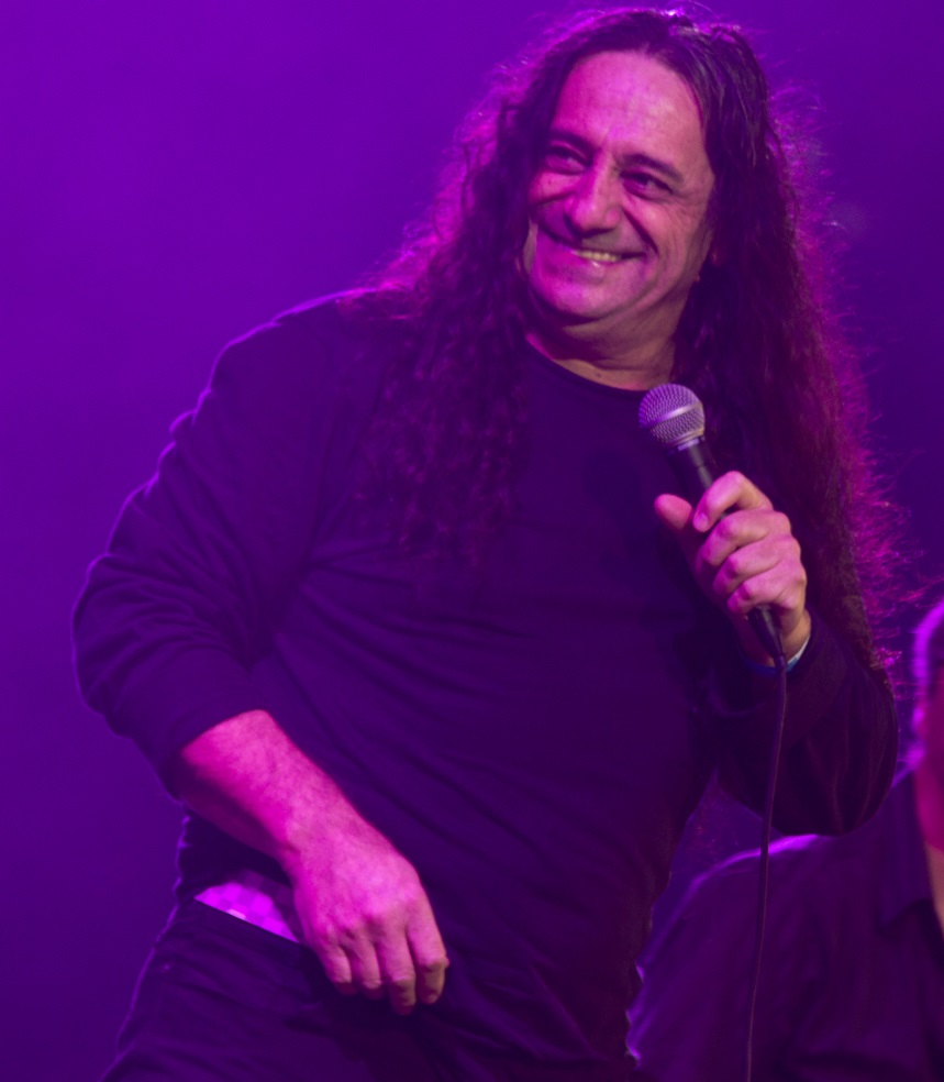 Omar Mollo en vivo (2015).